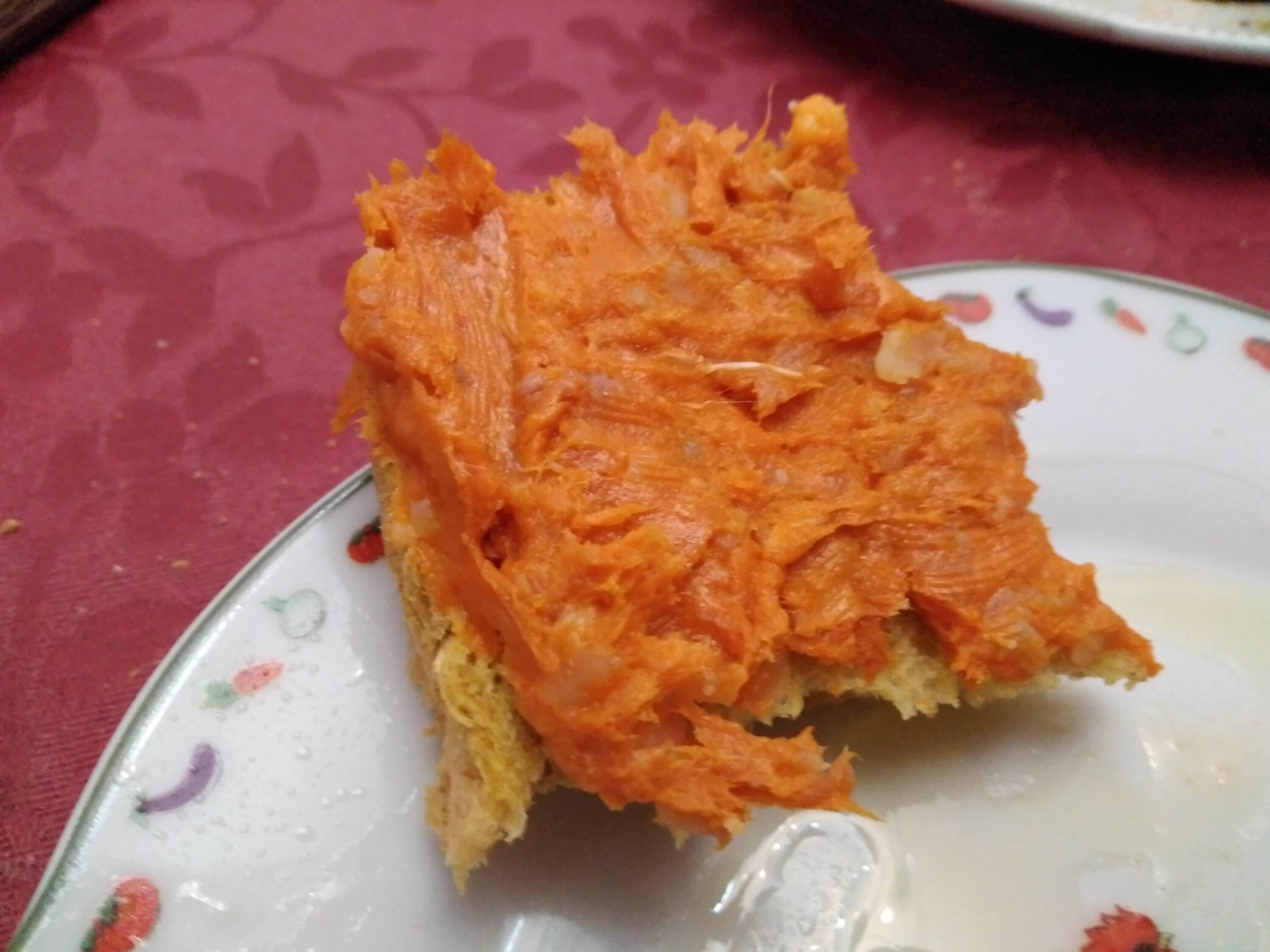 morcilla patatera de Monroy, Cáceres